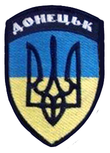 Емблема роти МВС «Донецьк».